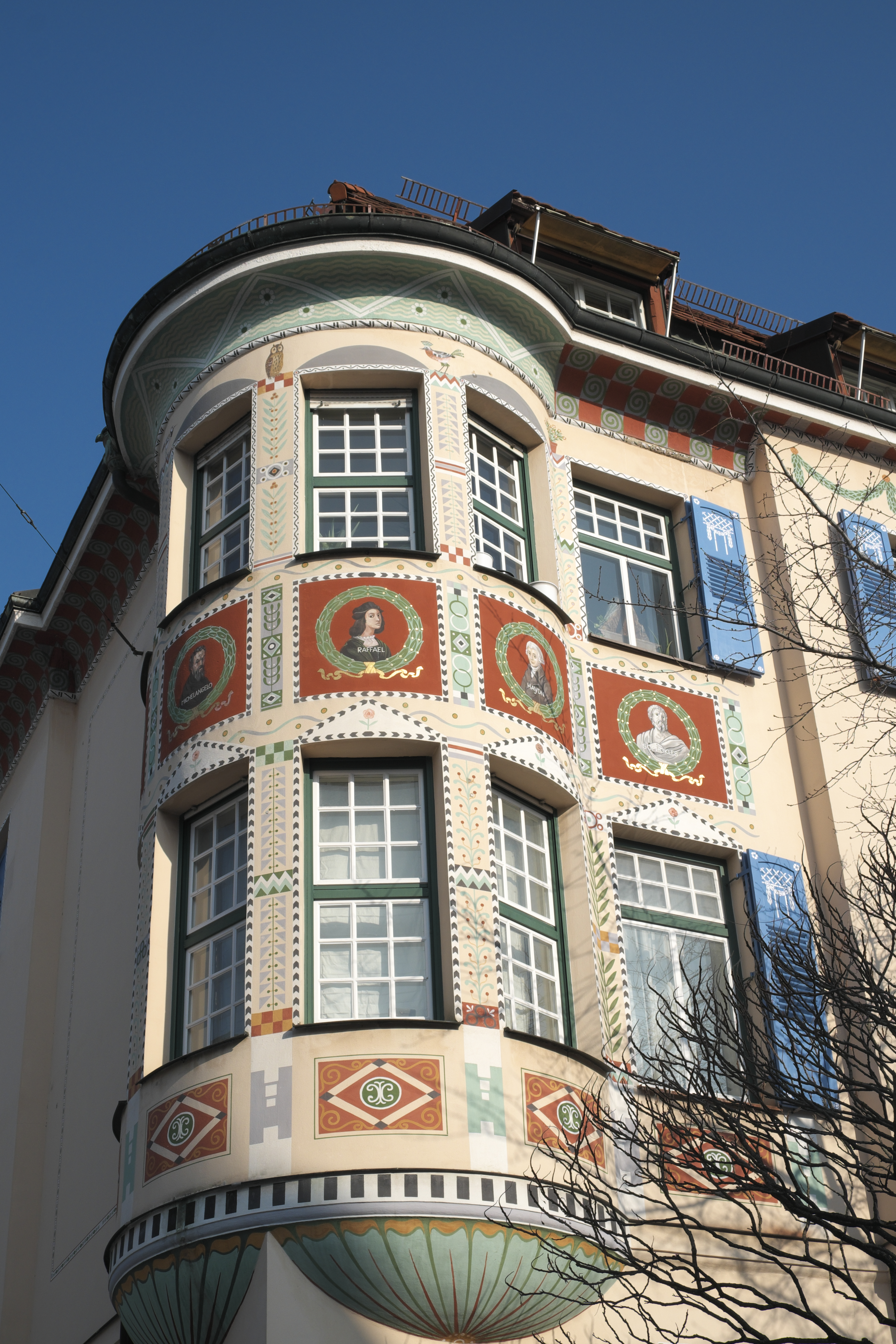 Palais Bissing in der Georgenstraße 10 im Stadtteil Schwabing (Stadtbezirk Schwabing-Freimann) in München (Bayern/Deutschland)